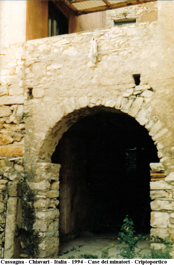 Cassagna - Chiavari - Italia - 1994 - Case dei Minatori - Architettura a Criptoportico